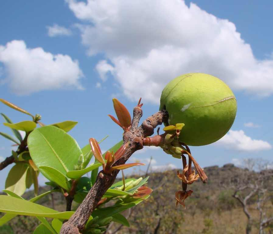 Hancornia speciosa - APOCYNACEAE - Jardim Botânico de Brasília - DF - Brasil